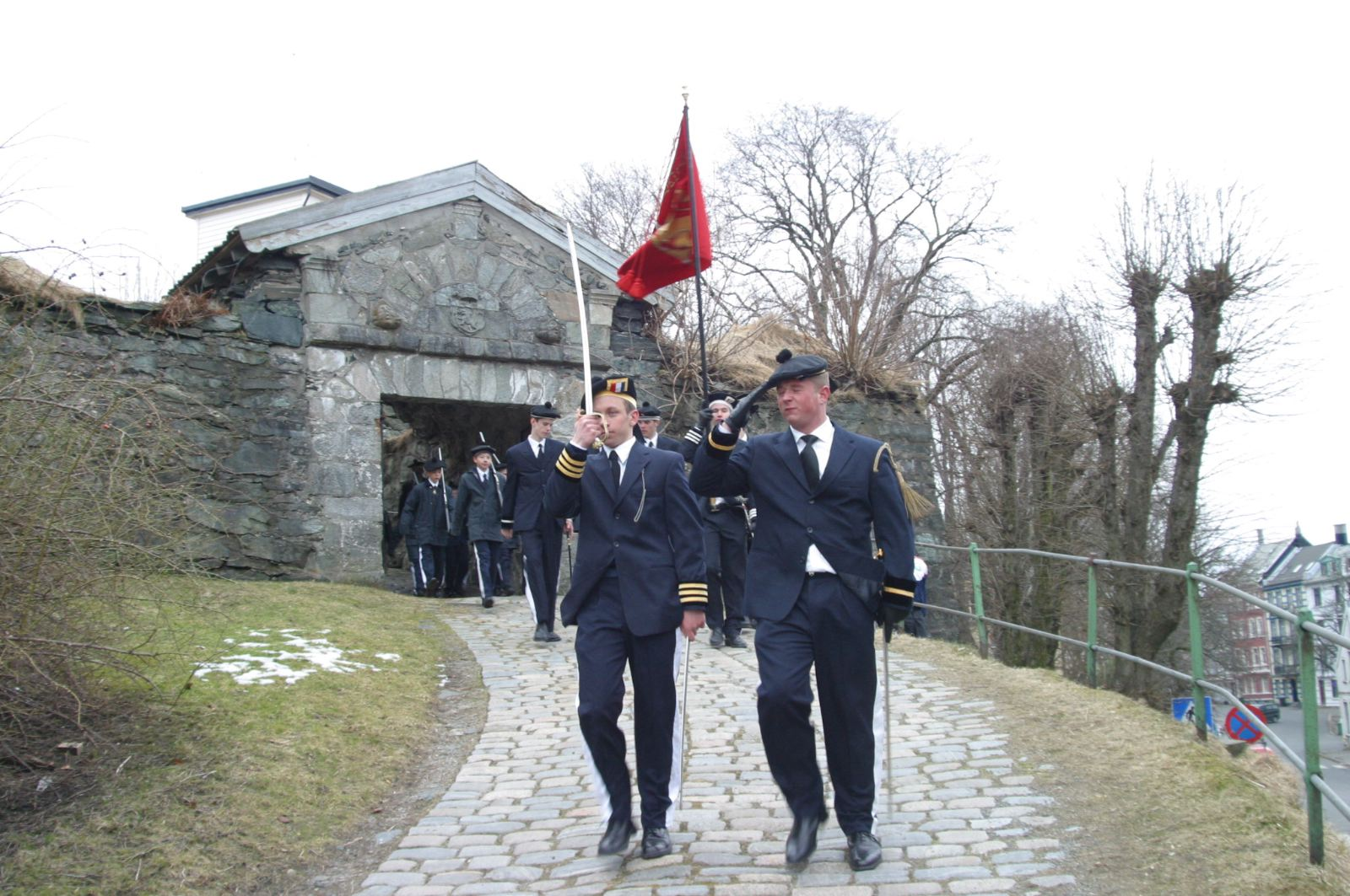 Fredriksberg Fort Bergen Photo: Nina Aldin Thune